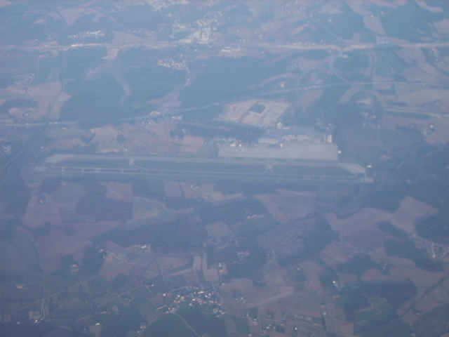 Vista aérea aeropuerto de Gerona